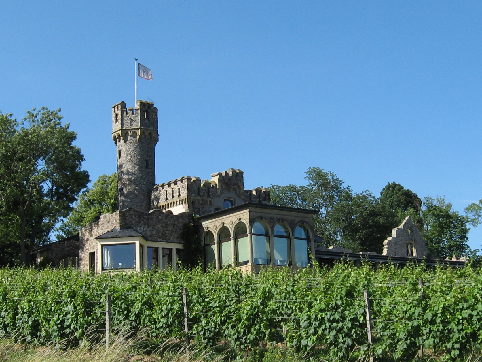 Burg Schwarzenstein